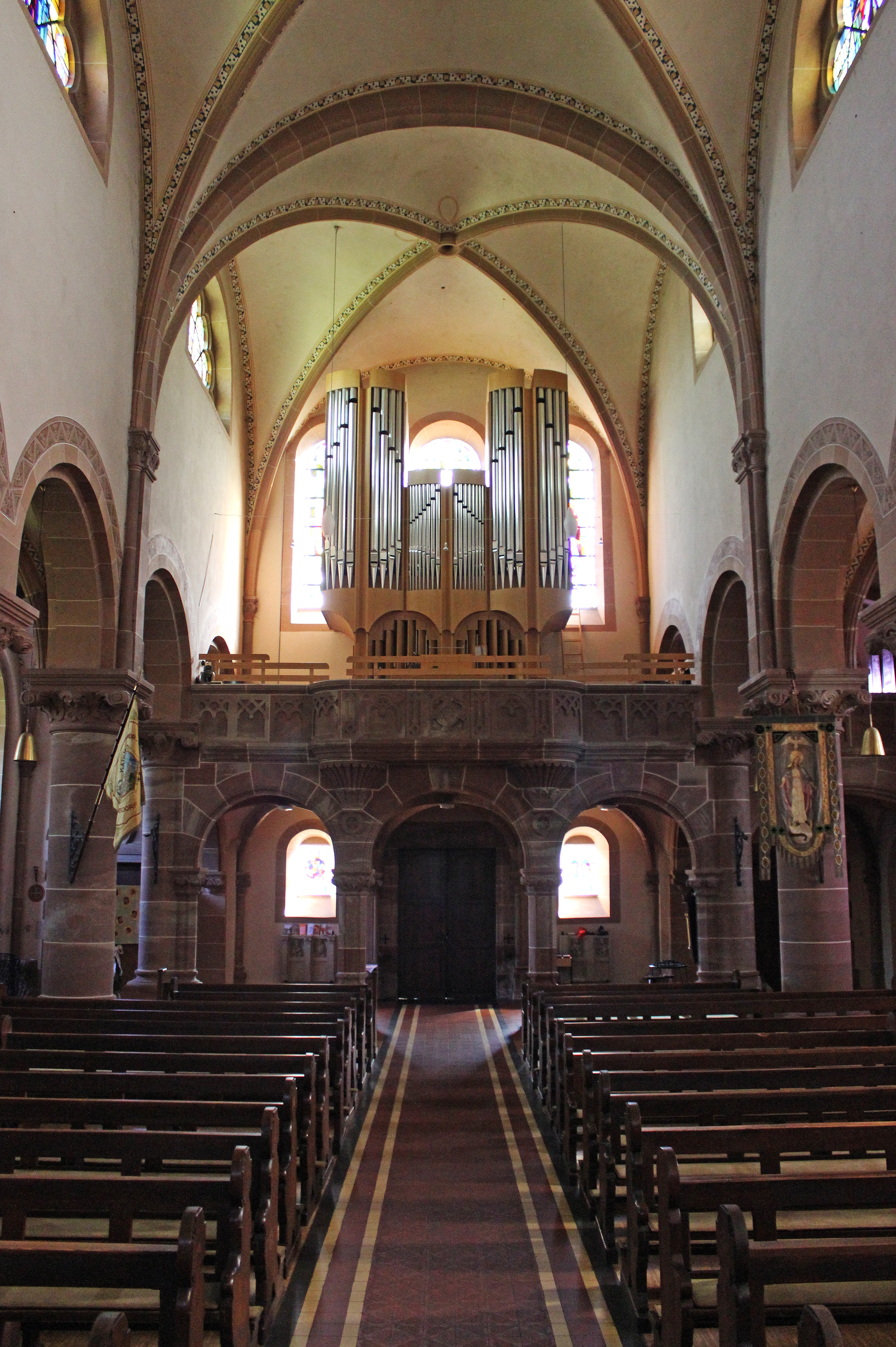 Blick ins Innere der katholischen Pfarrkirche St. Mauritius in Fremersdorf, einem Ortsteil der Gemeinde Rehlingen-Siersburg, Landkreis Saarlouis, Saarland